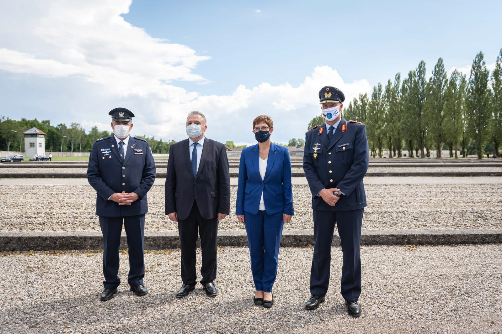 היום (שלישי), התקיים כחלק מתרגיל חיל האוויר בגרמניה, מטס "זיכרון לעתיד" - מטס הצדעה משותף בהובלת מפקד חיל האוויר, אלוף עמיקם נורקין, בליווי מפקדת טייסת הטיסה הראשונה בחיל-האוויר הישראלי, מפקדת טייסת "הנחשון", סגן-אלוף ג', ולצד מפקד חיל האוויר הגרמני, לוטננט גנרל אינגו גרהארץ. בהמשך היום נערך טקס קרקעי במחנה הריכוז "דכאו" בהשתתפות שרת ההגנה הגרמנית, גברת אנגרט קראמפ-קארנבאואר, שגריר ישראל בגרמניה, מר ג'רמי יששכרוף, מפקדי חילות-האוויר ונציגים נוספים.